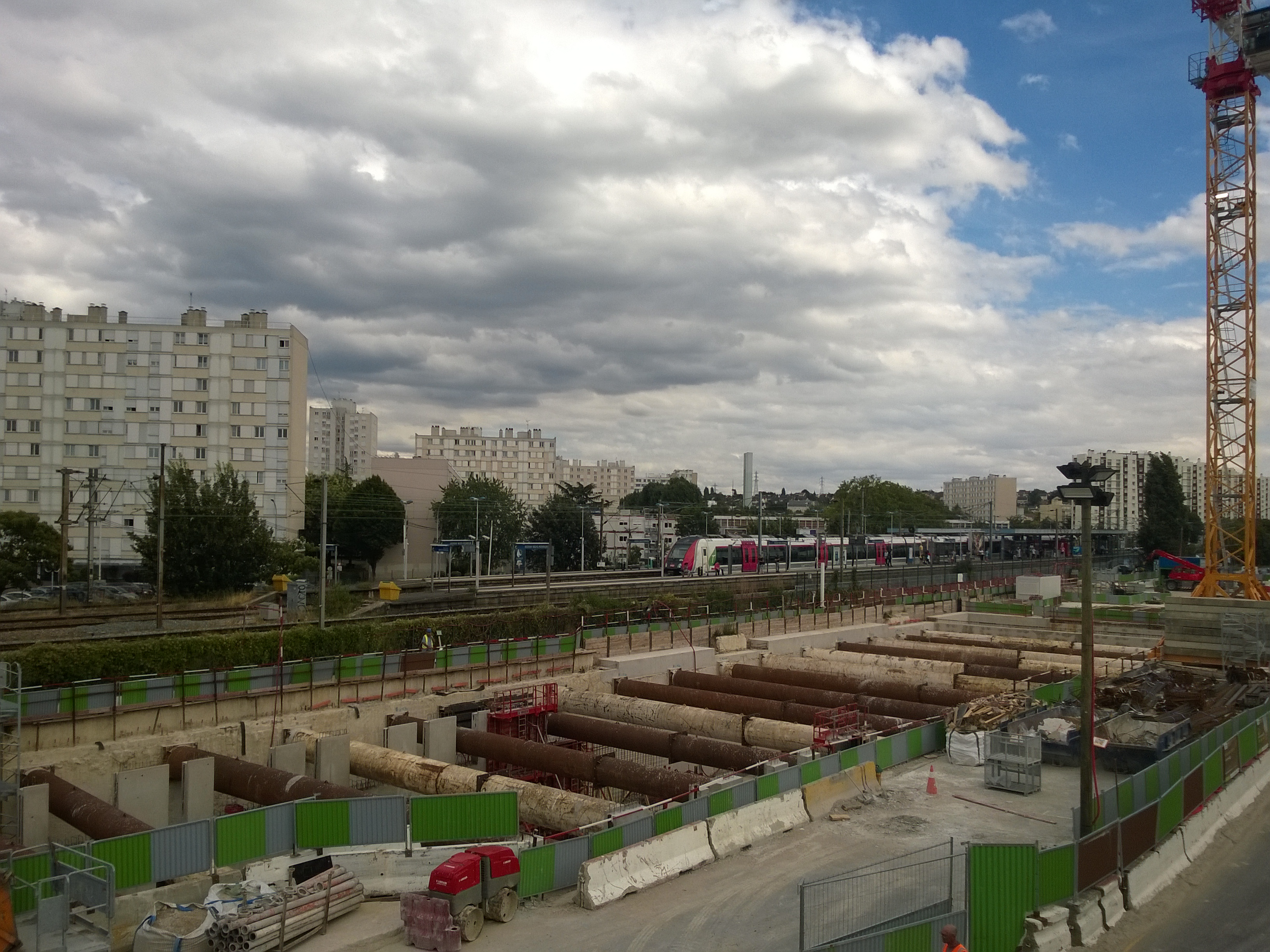 Depuis le parking supérieur du centre commercial Rosny 2, les quais de la gare et sa ligne, avec une Z 50000 sans arrêt pour Paris, et les travaux de la ligne 11.